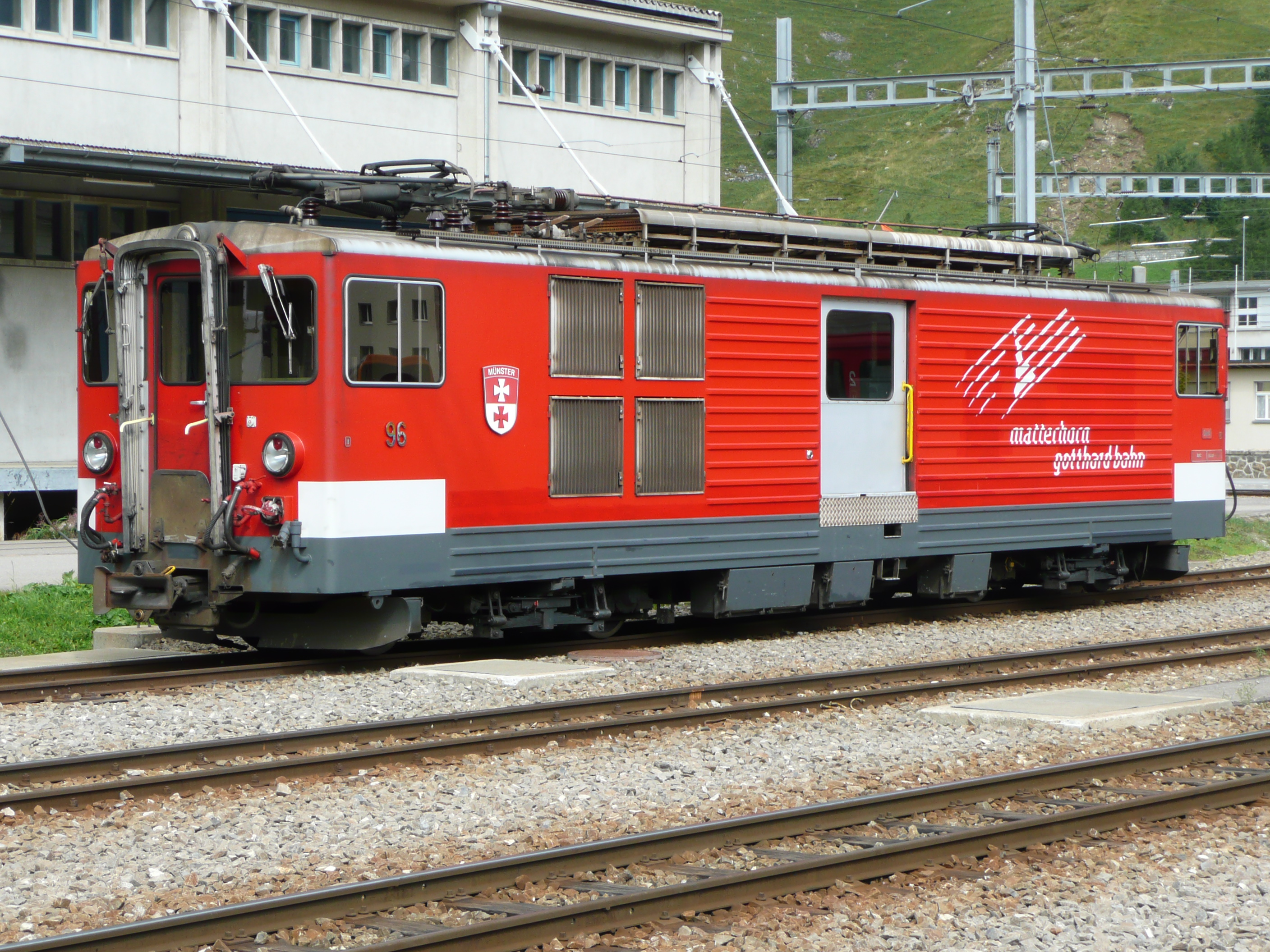 Deh 4/4 Nr. 96 im Bahnhof Andermatt. Sicht auf die Seite mit Faltenbalg. Die halbautomatische GF-Kupplung für den Pendelzugeinsatz ist montiert.